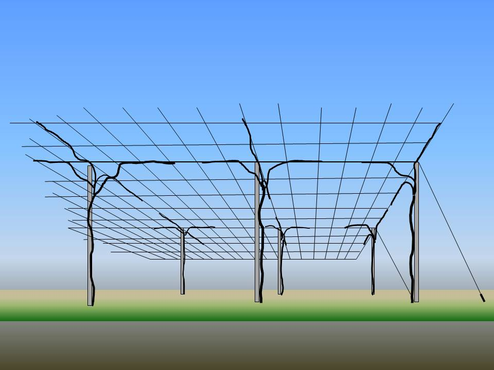 Pergolaerziehung, italienisch Tentone